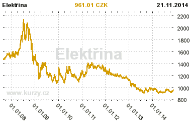 Elektřina - Cena komodity.